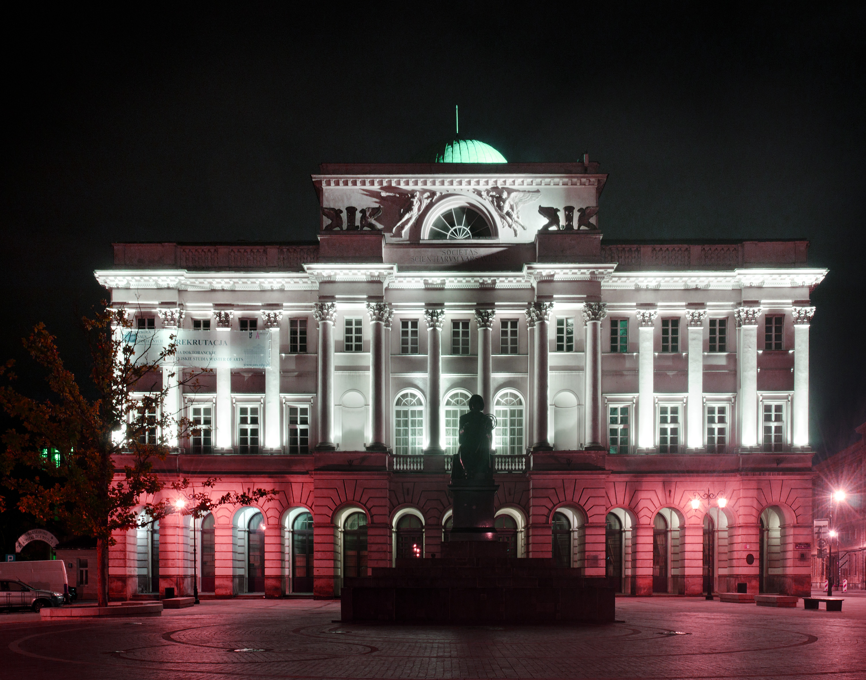 pałac Staszica, 1820-23, 1947-50, nr 370